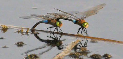 Momento que libélula fêmea põe ovos acompanhada pelo macho.